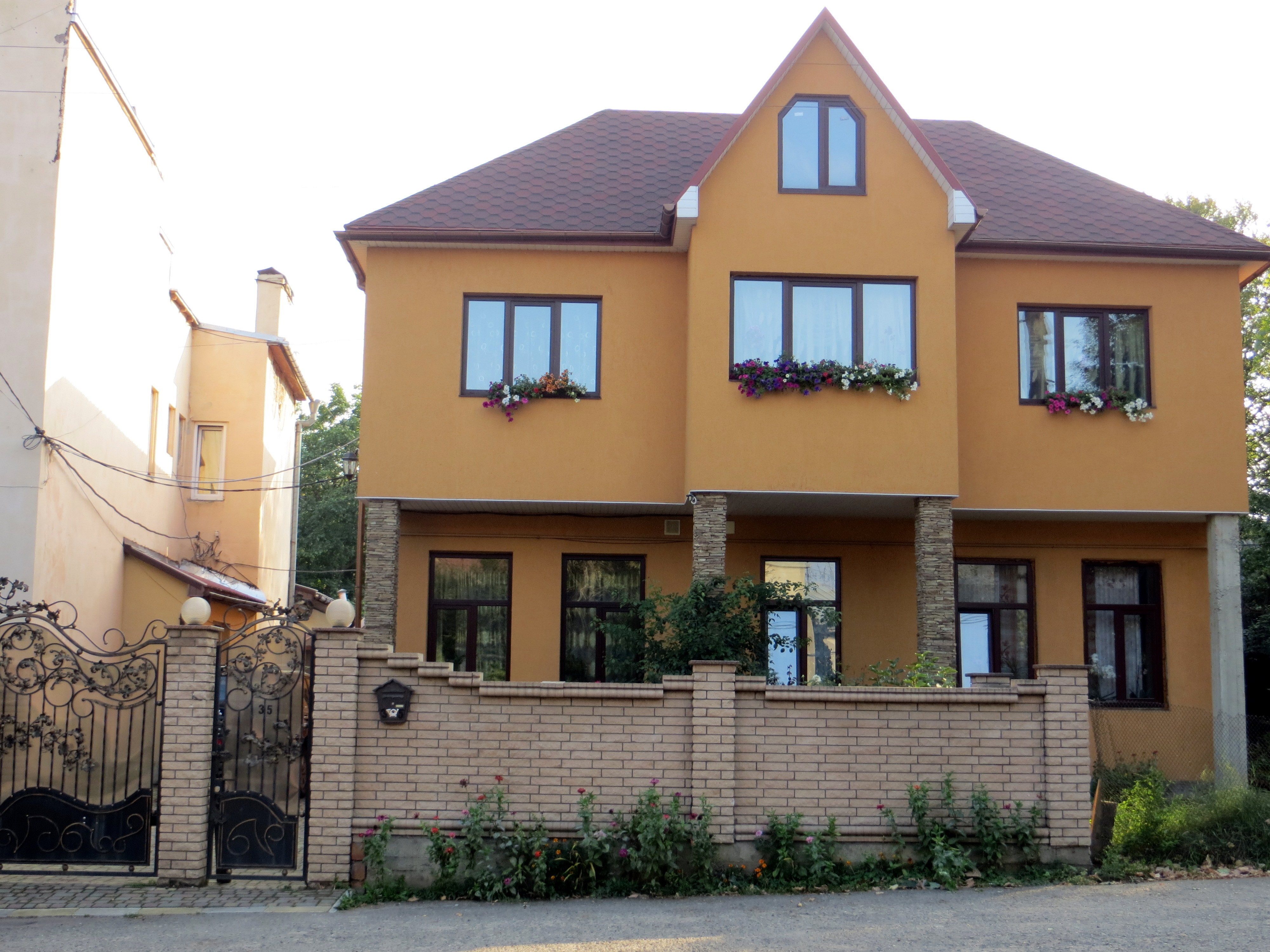 Житловий будинок, Чернівці, вул. О. Щербанюка, 35